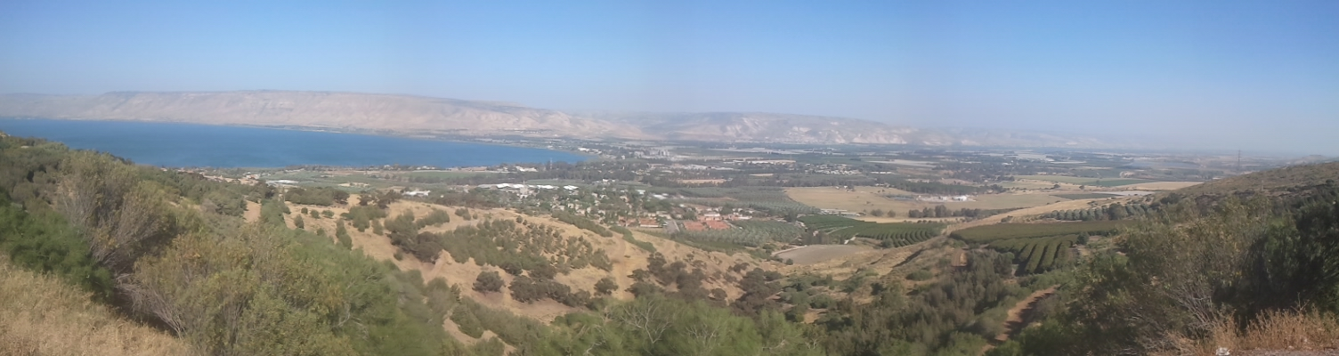 עמק הירדן, תצפית מהמצפור בכביש 767 היורד מצופת אלומות למושבה כנרת. במרכז התמונה קבוצת כנרת, מעליה דגניה א, משמאל התמונה חוות כנרת